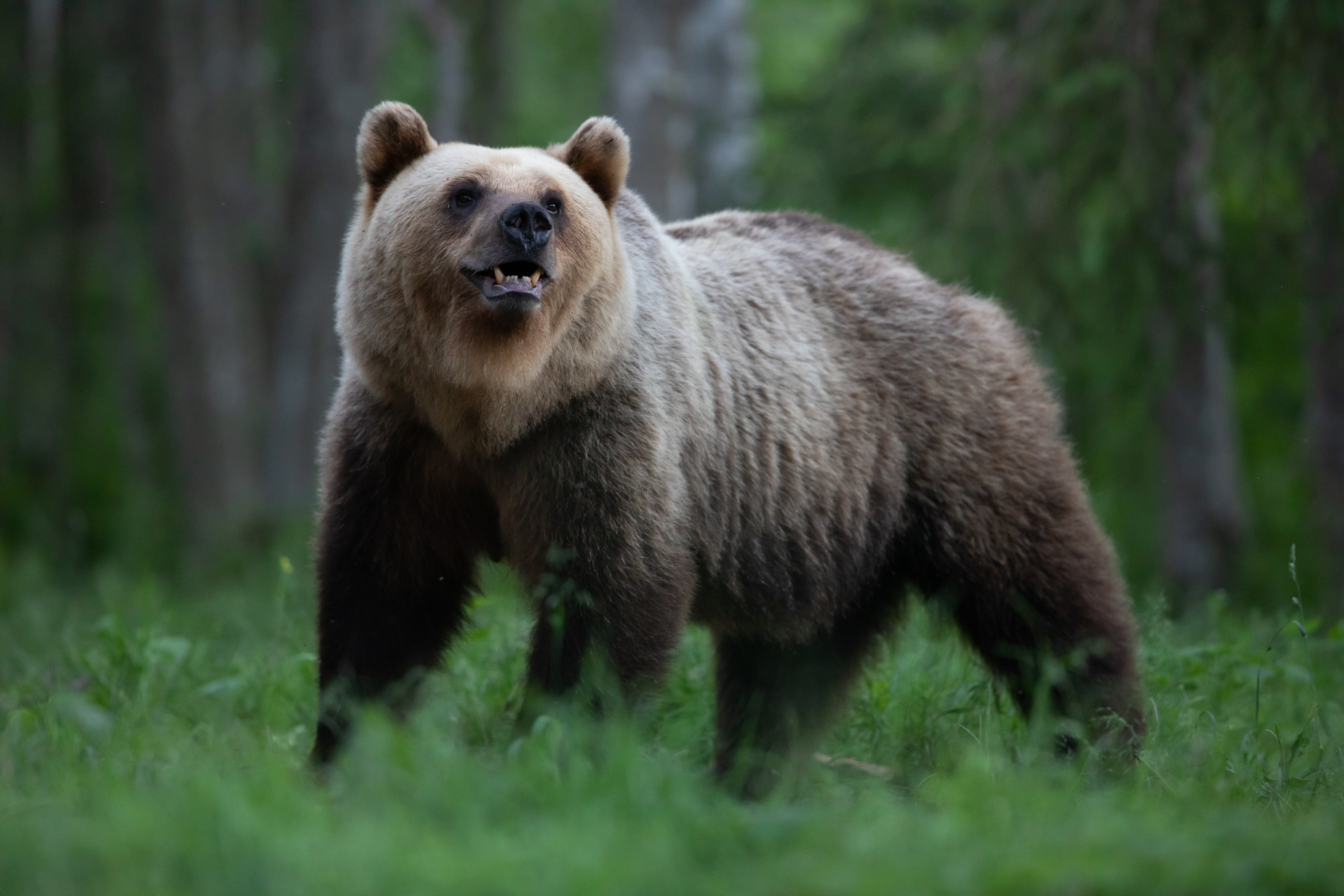 Emakarud on tavaliselt madalamate jalgadega ja heledama karvaga. Emakarude jalajälg ei ole üldislet üle 14 cm. Pildistatud Eleri Lopp-Valdma karuvarjest Kesk-Eestis.